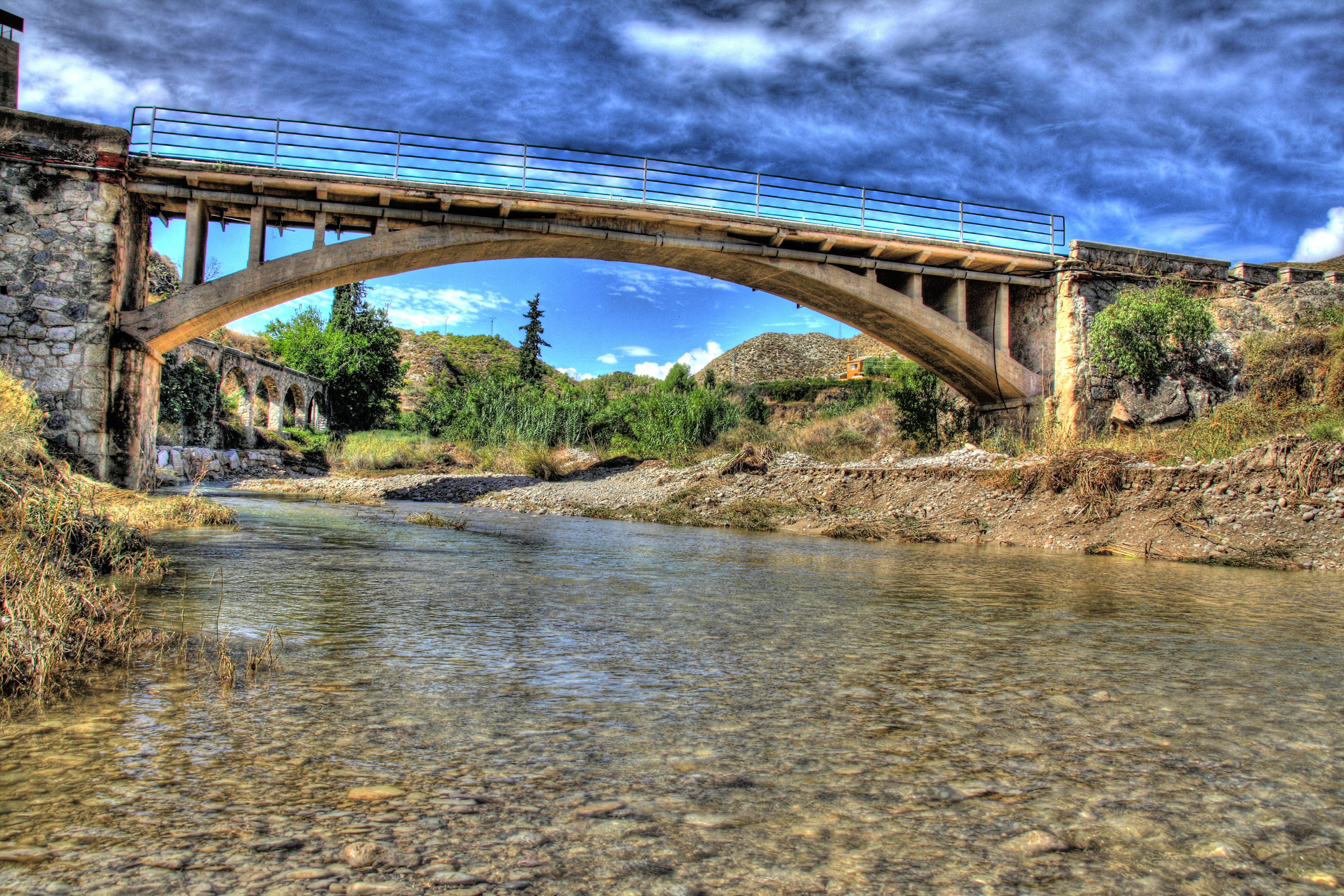 Río Argos a su paso por la localidad de Cehegín